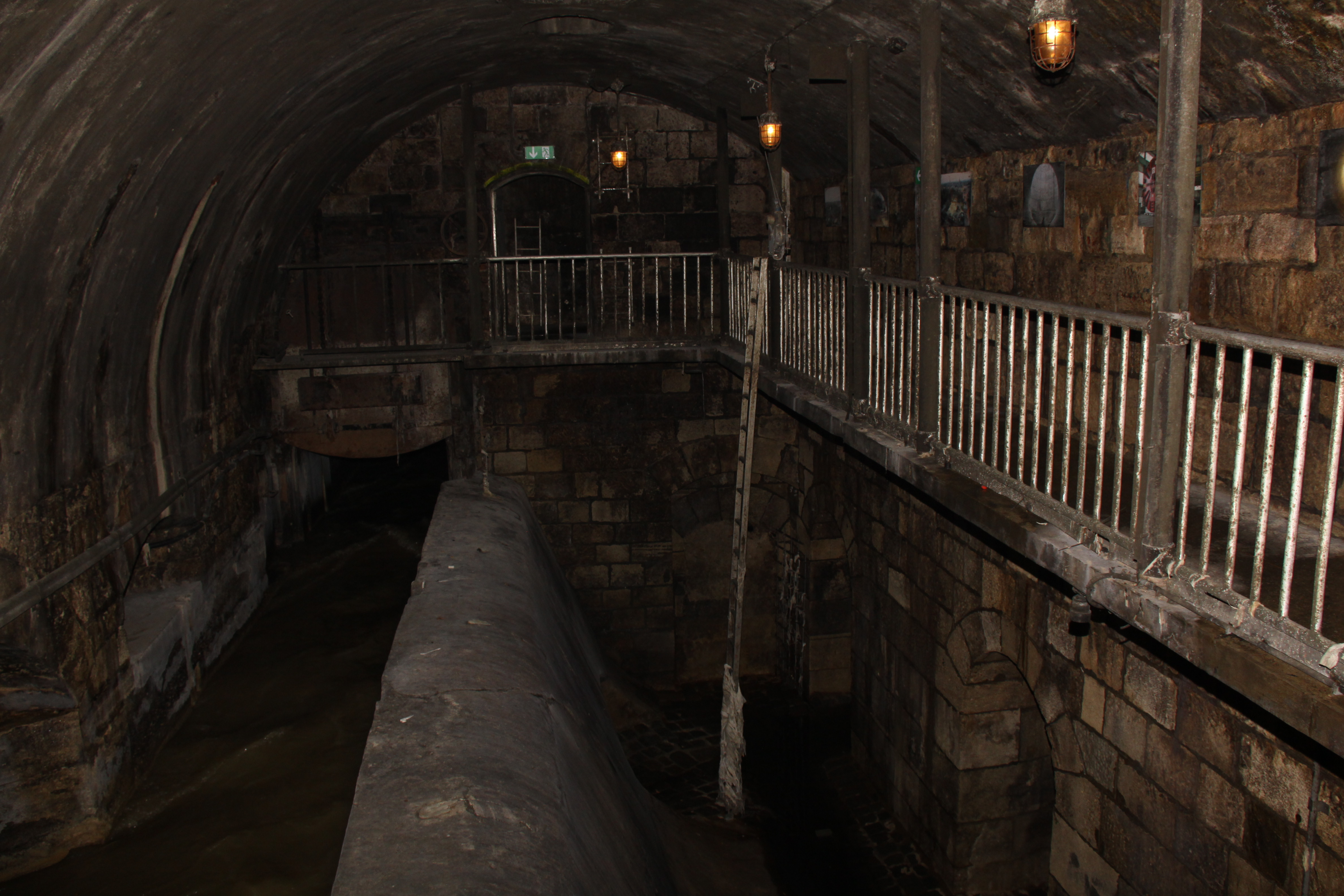 Foto aufgenommen bei einer Besichtigung des Kanalnetzes in Wien (3. Mann Tour) am 11. September 2009